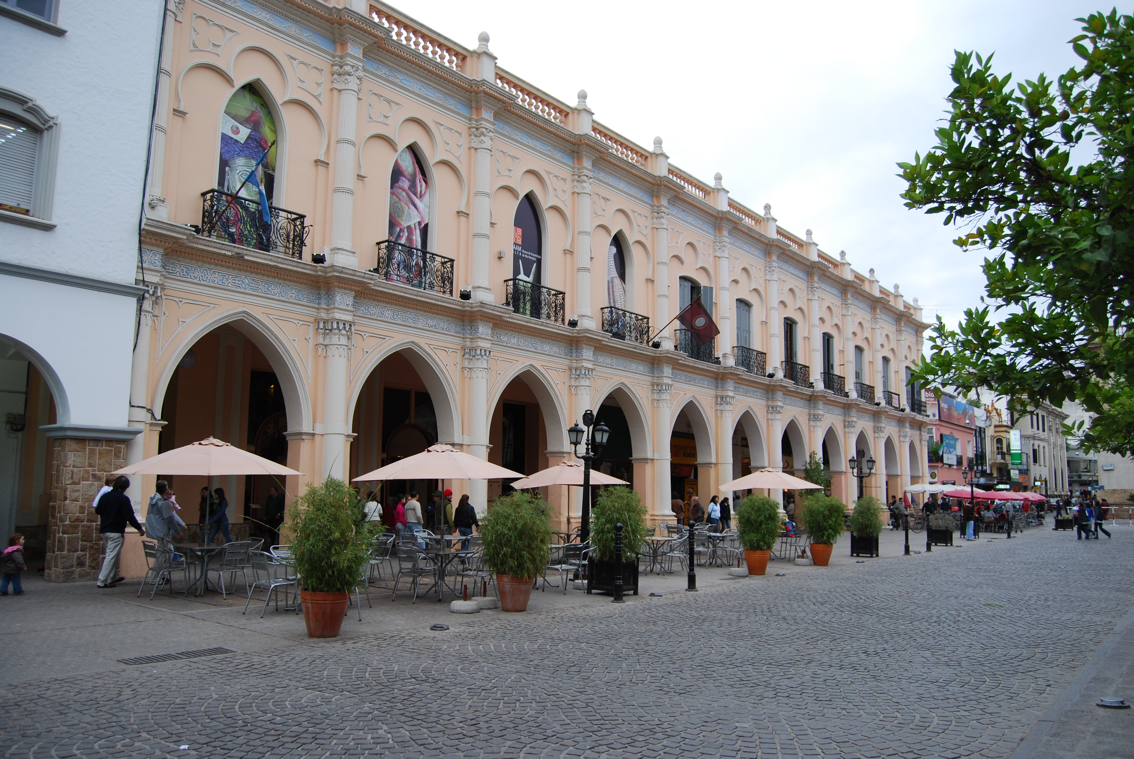 MAAM - Salta